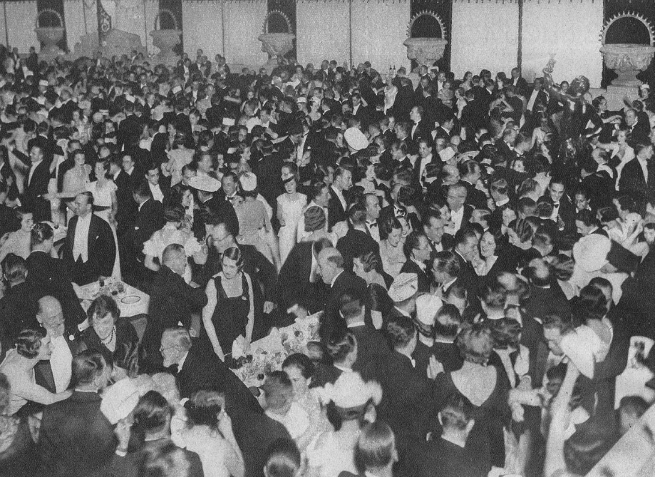 "La cena de Año Nuevo en el Club de la Unión". En Revista Ecran 1934